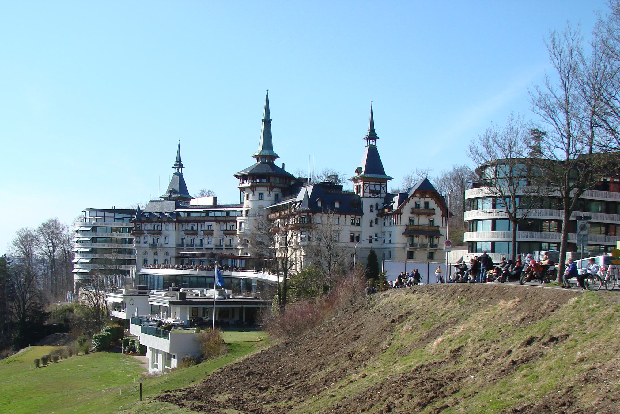 The Dolder Grand, Zürich, Switzerland